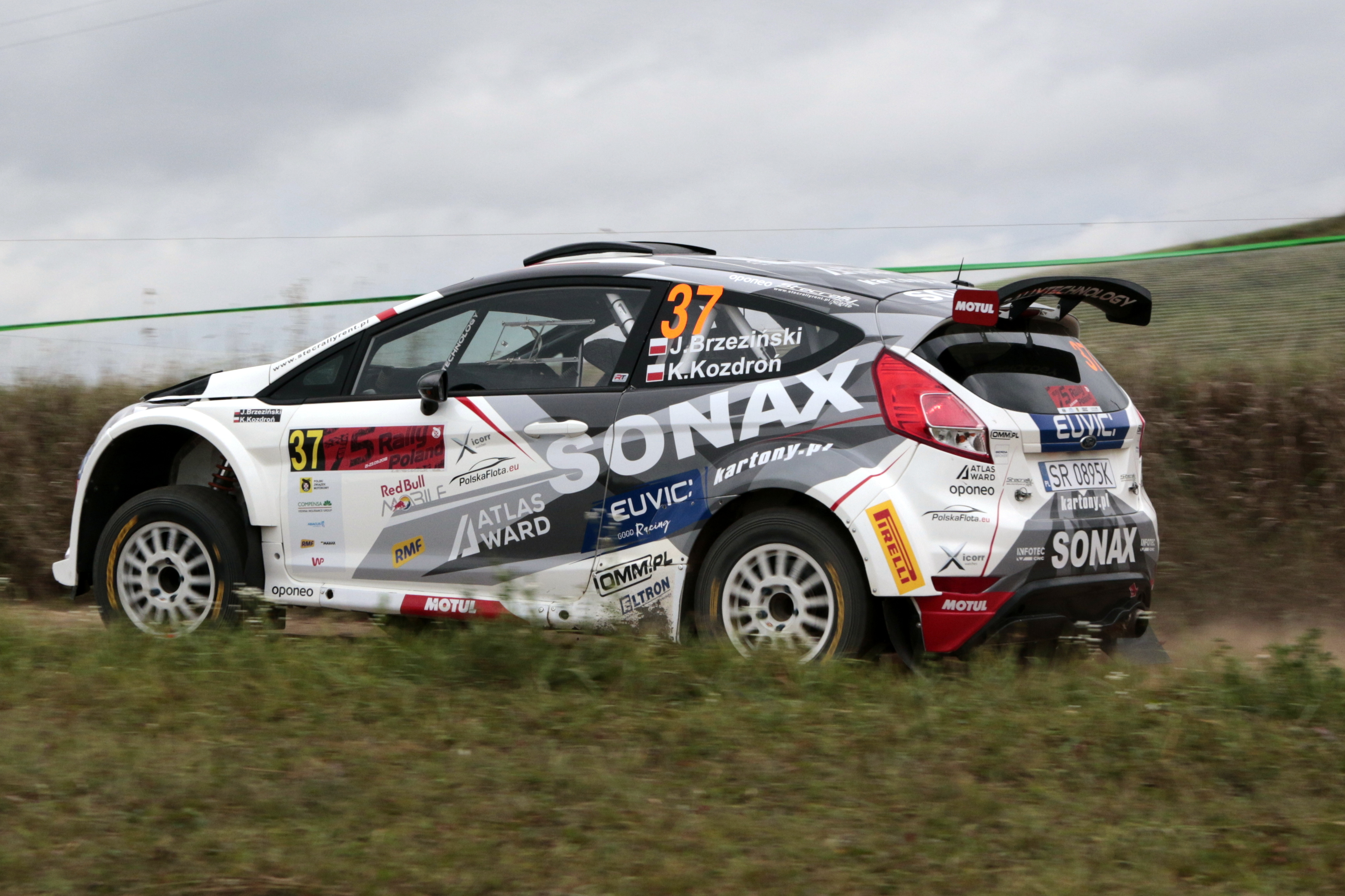 Rajd Polski - 2018 Jakub Brzeziński